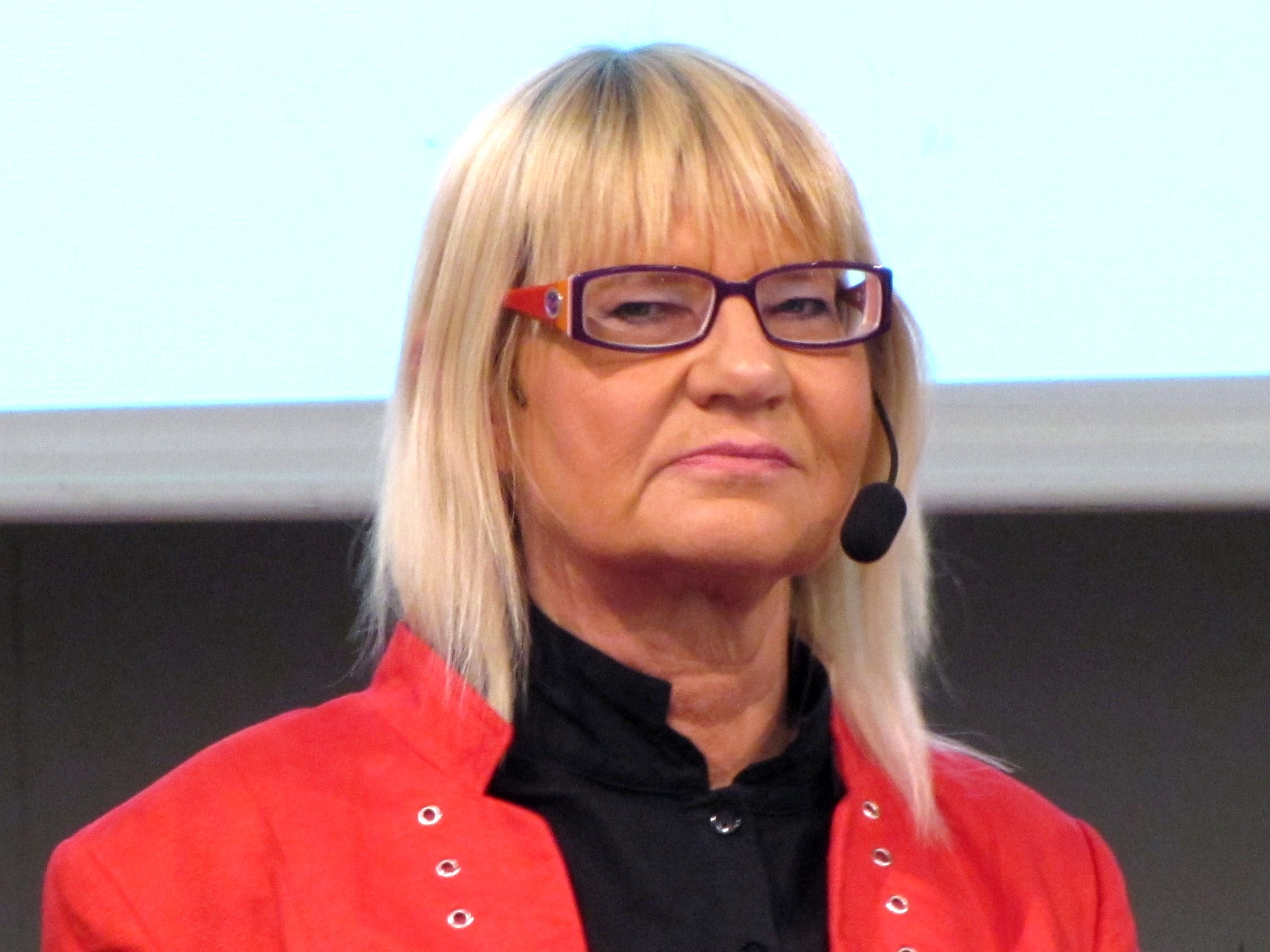 Marie-Louise Danielsson-Tham på Bokmässan i Göteborg 2010.